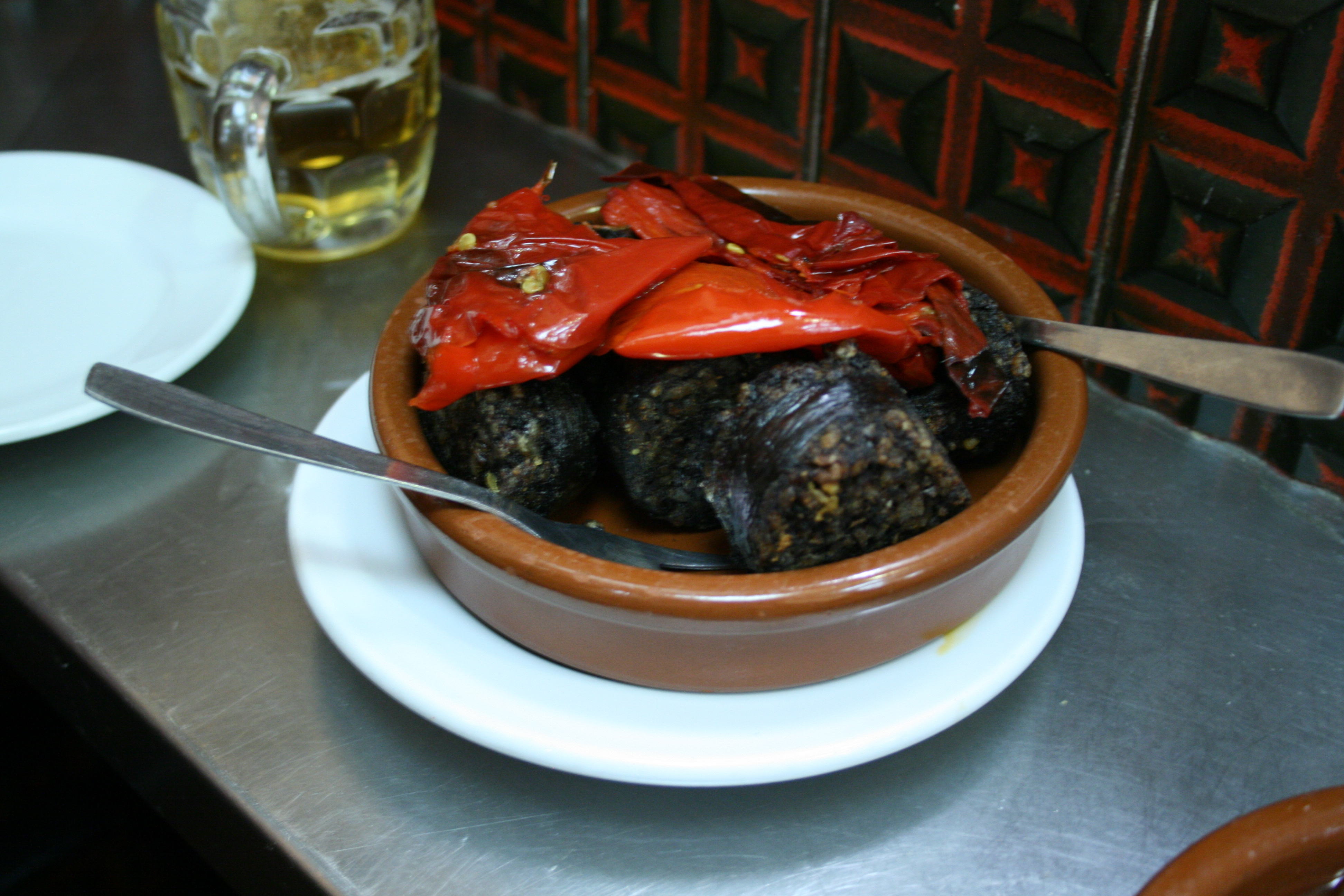 Morcilla (de arroz) con pimientos rojos